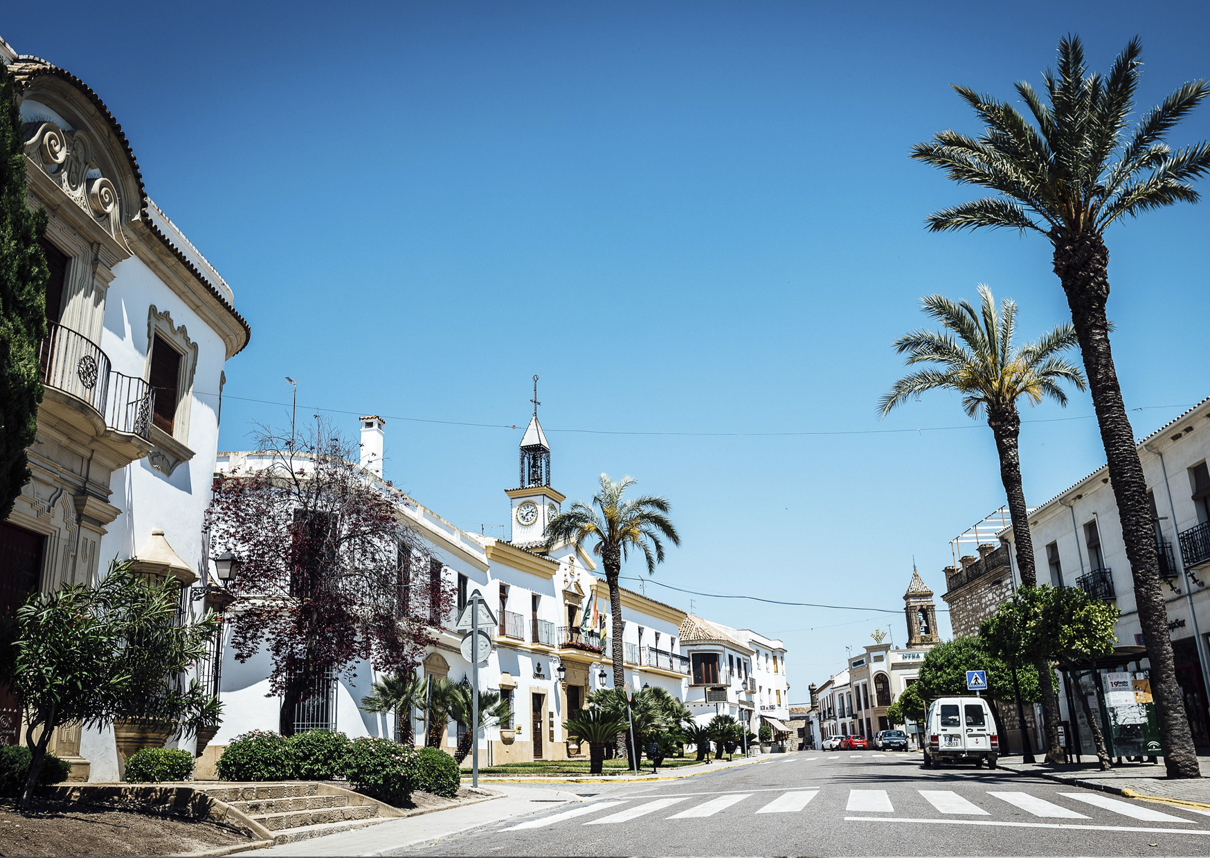 Ayuntamiento